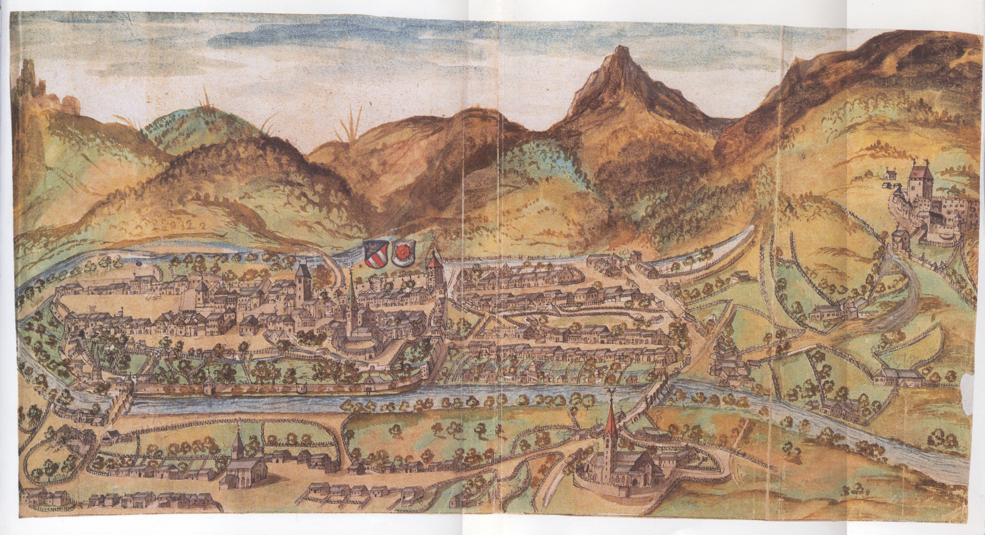 Eine der ältesten Ansicht von Lienz aus den Jahren 1606/08. Das Aquarell wurde von einem unbekannten Maler als Beilage zum Geschichtswerk "Der Tiroler Adler" von Matthias Burgklechner geschaffen.